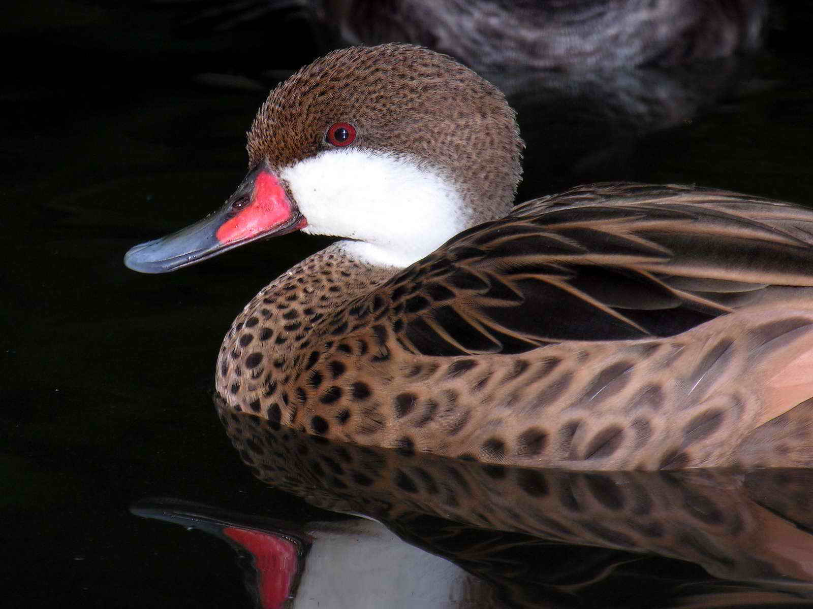 Foto tirada cunha Nikon E8800